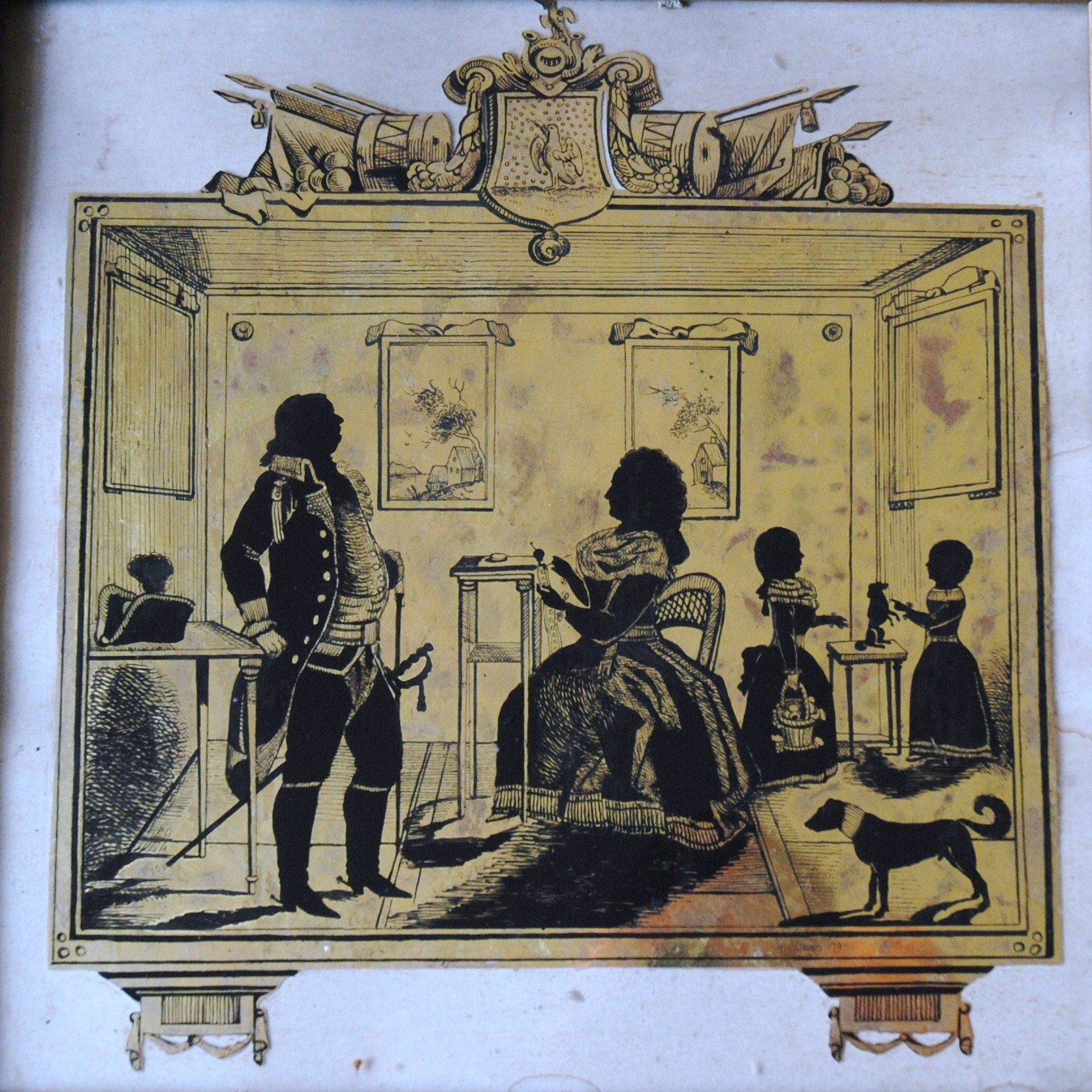 Églomisé, Bildplatte, Hinterglas, Darstellung der Familie Ebinger von der Burg , Ausführung in Schwarzlot auf Goldfond, gerahmt, Ende 18. Jh., Privatbesitz. Krafft-Ebing'sches Familienarchiv Graz (A).